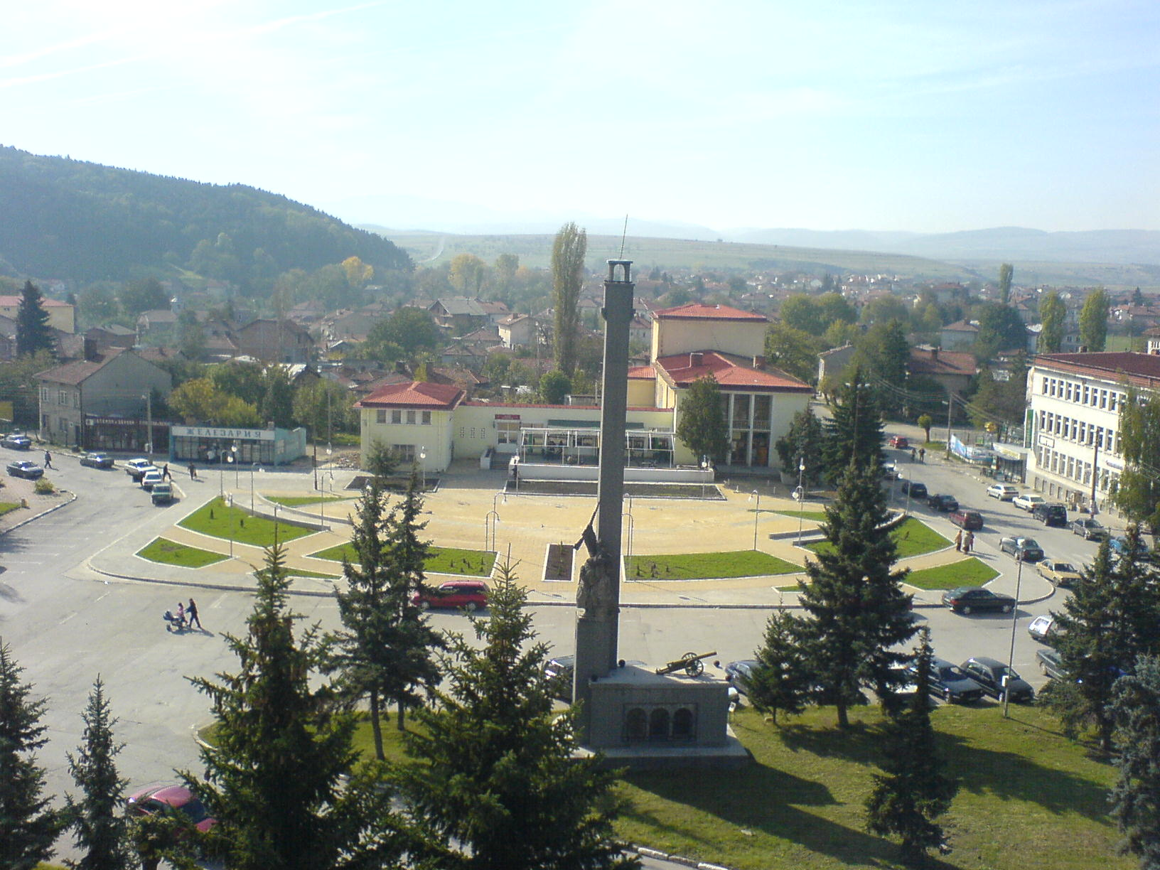 Централната част на Сливница с Паметника на загиналите в Сръбско-българската война от 1885 г.